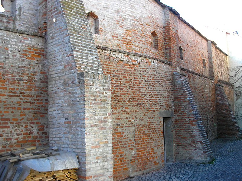 Stadtbefestigung Friedberg (Landkreis Aichach-Friedberg, Bayerisch-Schwaben). Innenseite der Westmauer. Eigene Aufnahme, Jan. 2007 / Friedberg city walls (Bavaria, Germany). Western wall from inside. Own photo, Jan. 2007